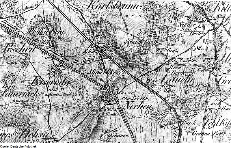 Original image description from the Deutsche Fotothek Löbau-Nechen. Oberreit, Sect. Zittau, 1844/46